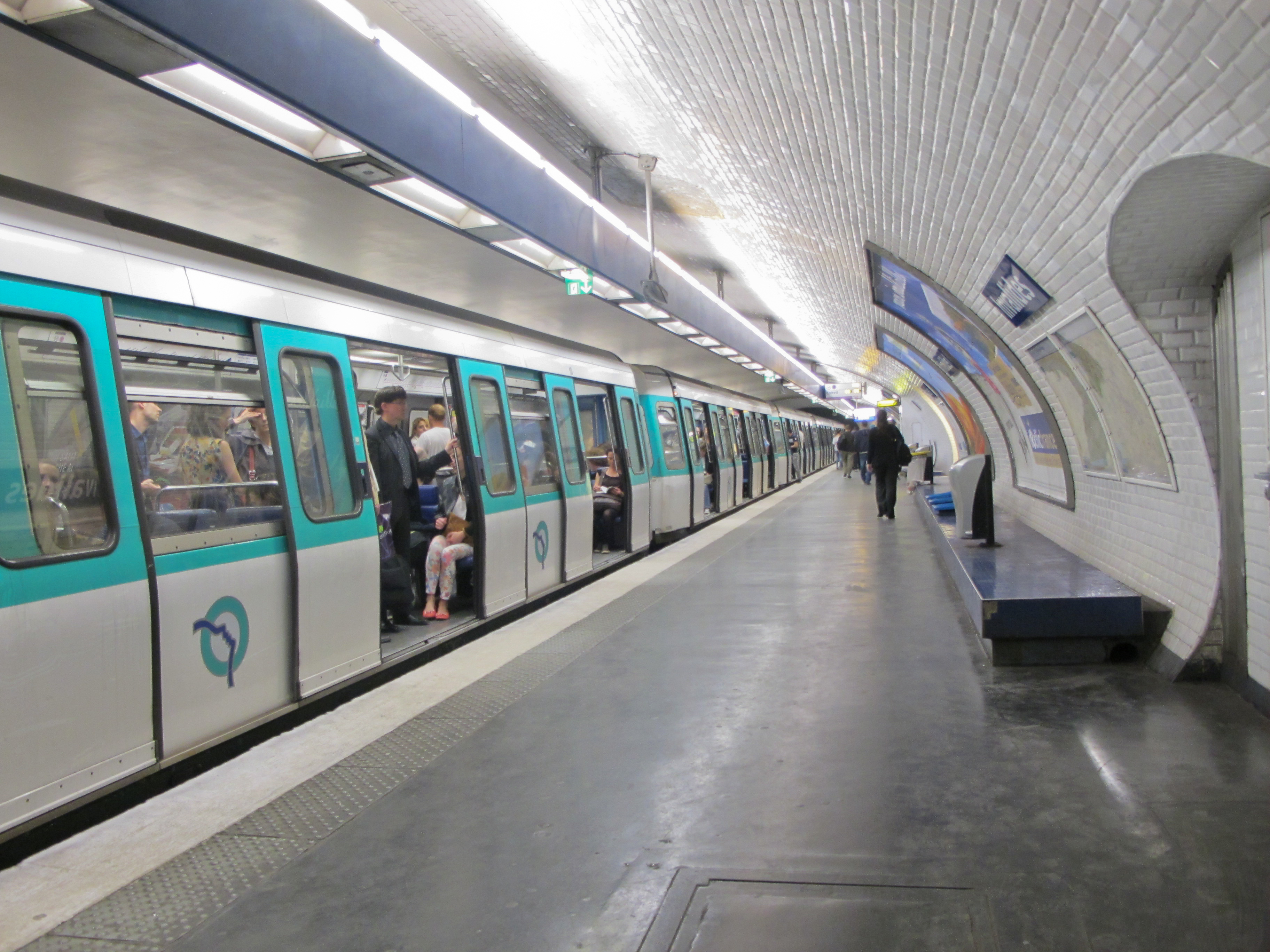 Station de métro Invalides (métro de Paris ligne 8), métro de Paris, France